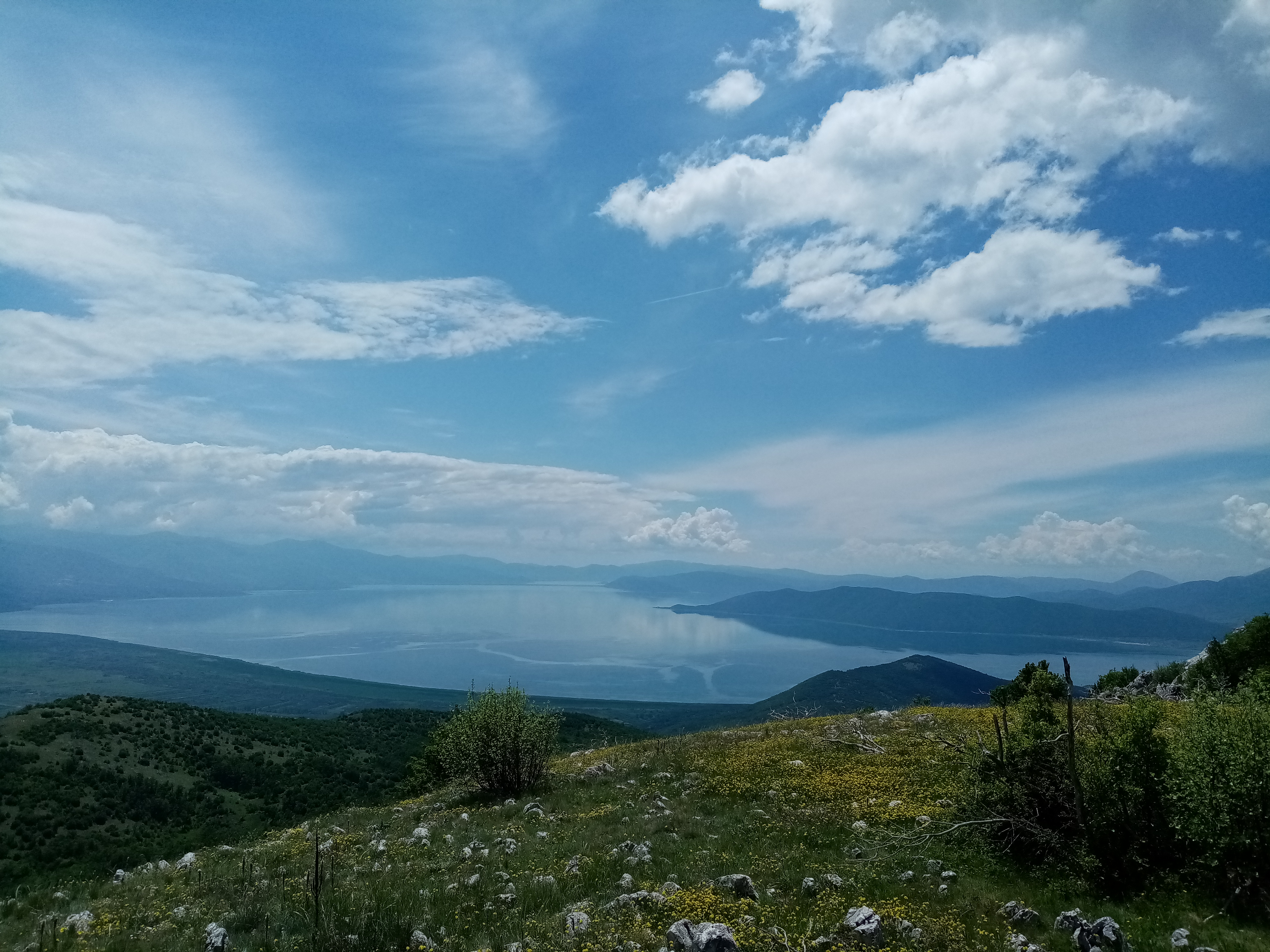 Поглед на Преспанско Езеро од местото викано Ветарник